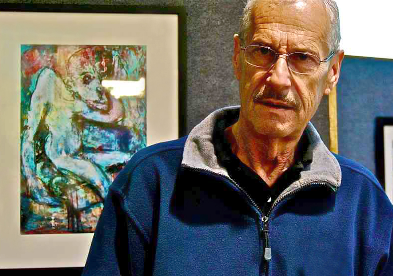 Der US-amerikanische Künstler Stefan Krikl; bei seiner Einzelausstellung Expressionist Cartoons (Drucke, Gemälde und Miniaturinstallationen) im Dezember 2009 in der Central Library and Art Gallery in Huntington Beach, Kalifornien.